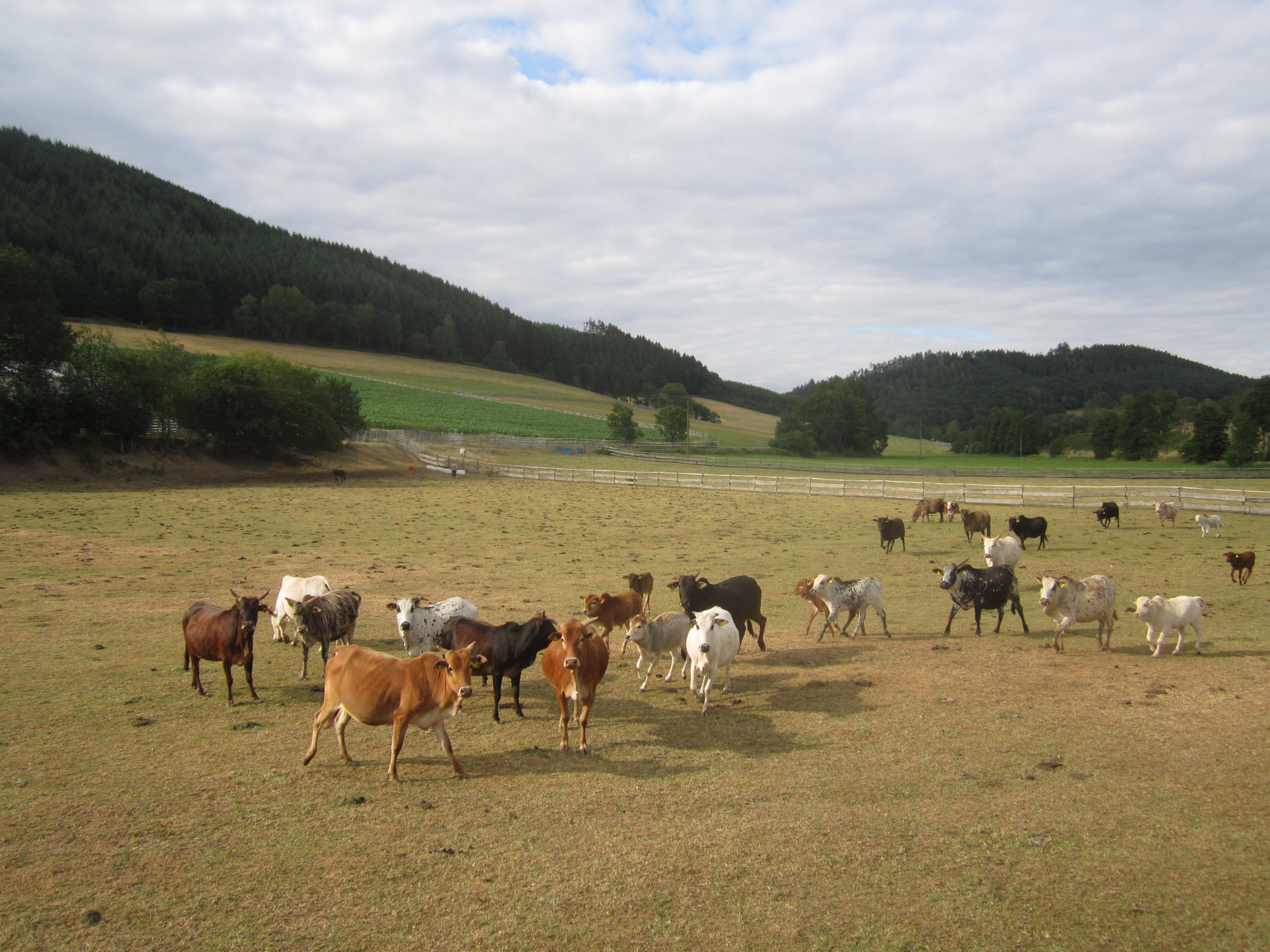 Landschaftsschutzgebiet Rumketal einschließlich Altenhellefelder Bachtal von Landstraße an Kreuzung am südwestlichen Rand. Auf Weide befinden sich Zwergzebus (Bos taurus indicus), auch Dwarf zebus genannt.